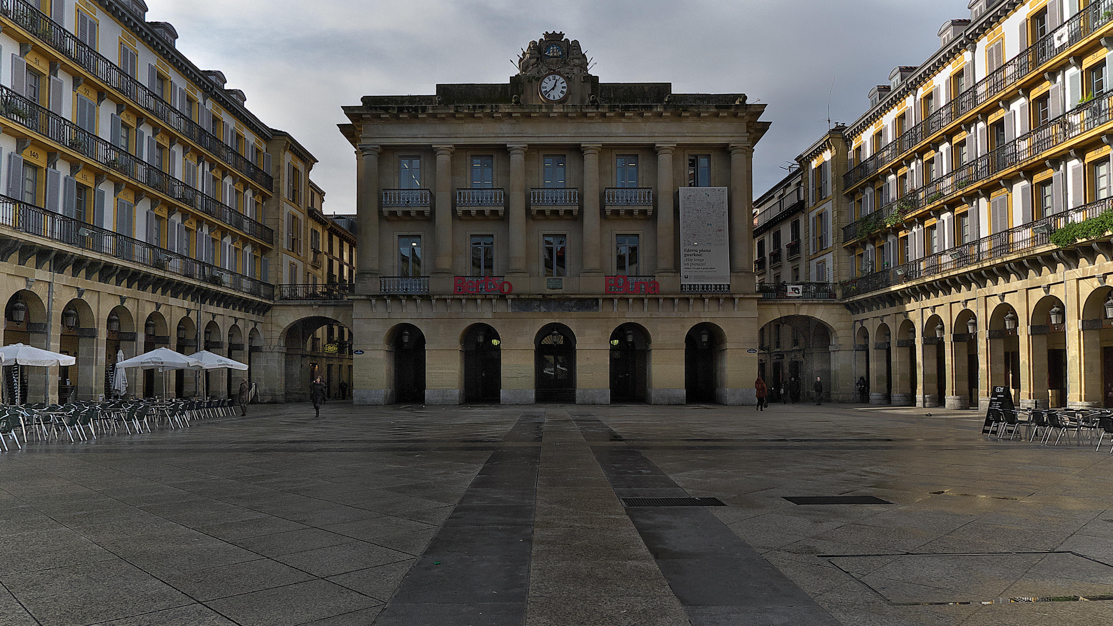 Plaza Mayor, según planos de Pedro Manuel de Ugartemendía (1815).